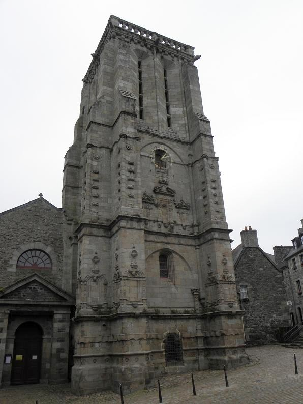 Tour et façade occidentale de l'église Saint-Mathieu à Morlaix (29).